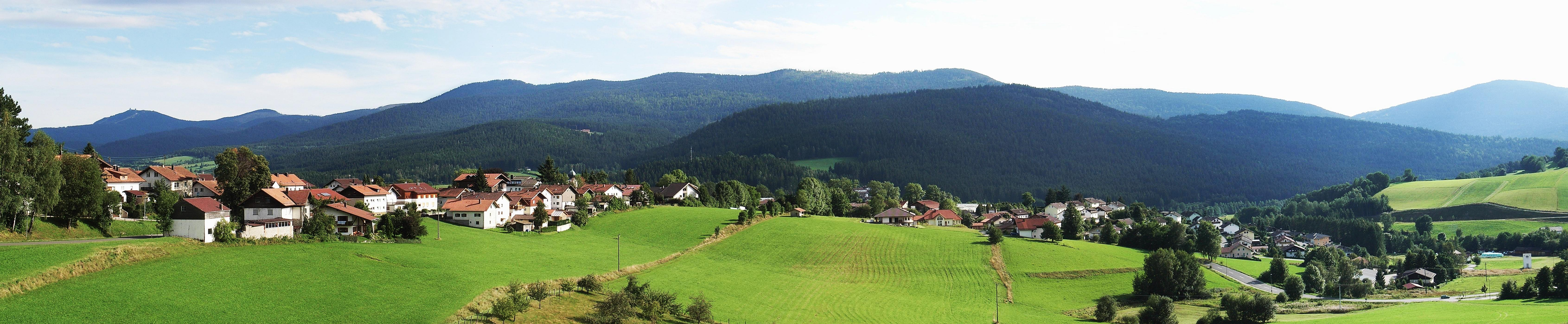 Panorama von Lam (Bayr. Wald) aus nördlicher Richtung mit dem Großen Arber links im Hintergrund